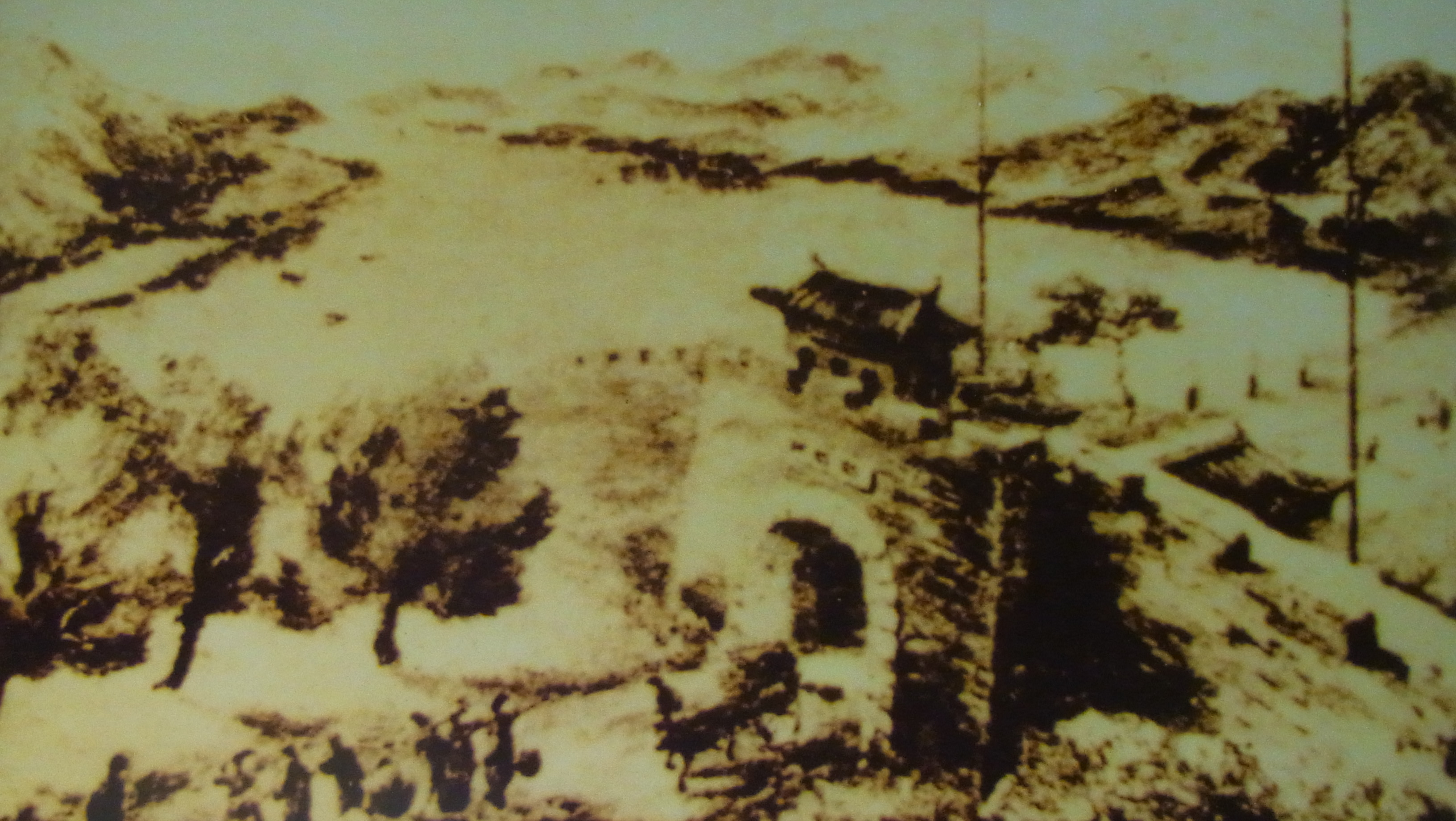 中文（香港）: 澳門中式城門古關閘